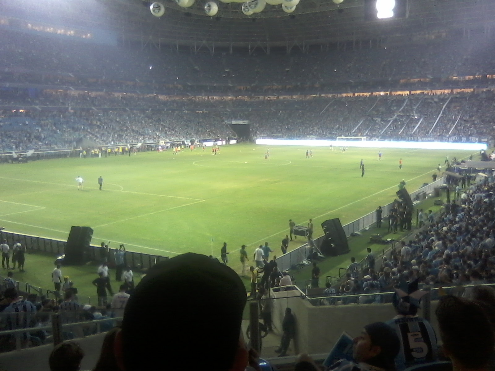 Foto do jogo de inauguração da Arena do Grêmio, em Porto Alegre, RS, Brasil, a 8/12/2012.